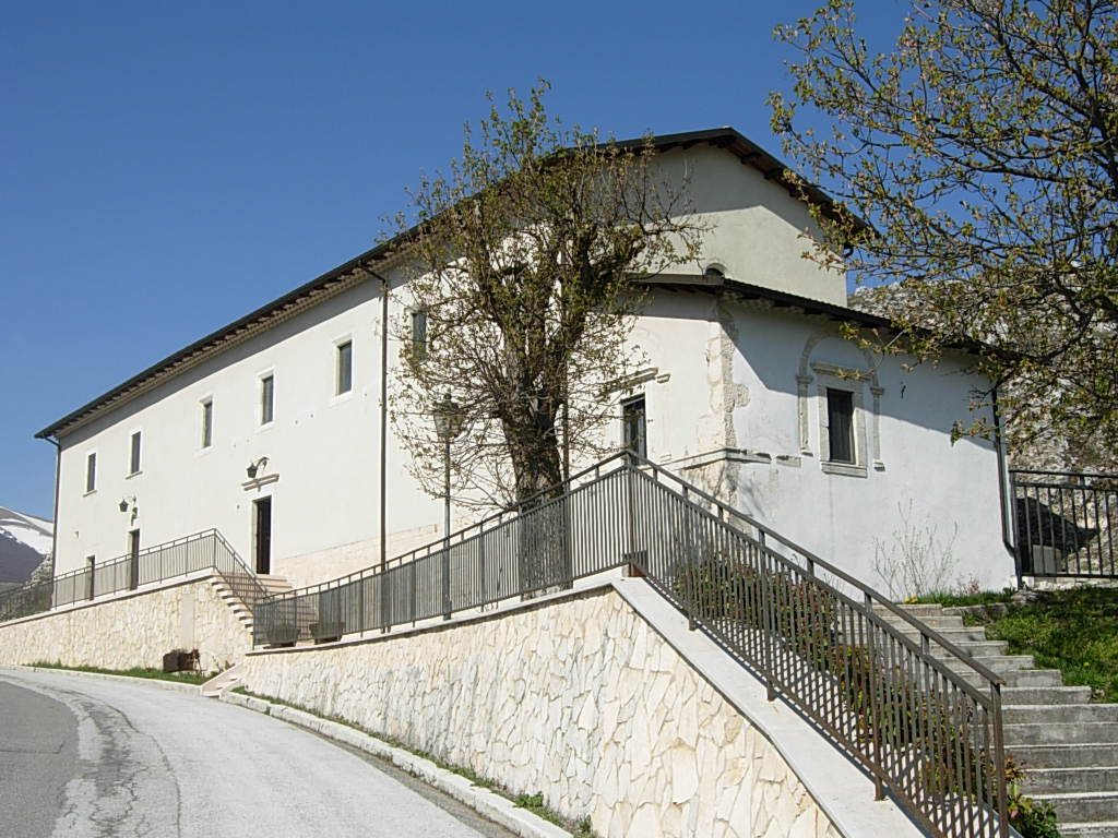 Santuario Madonna della Portella in Rivisondoli (AQ) Foto personale concessa in PD